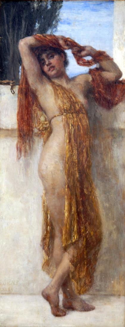 Orientalin